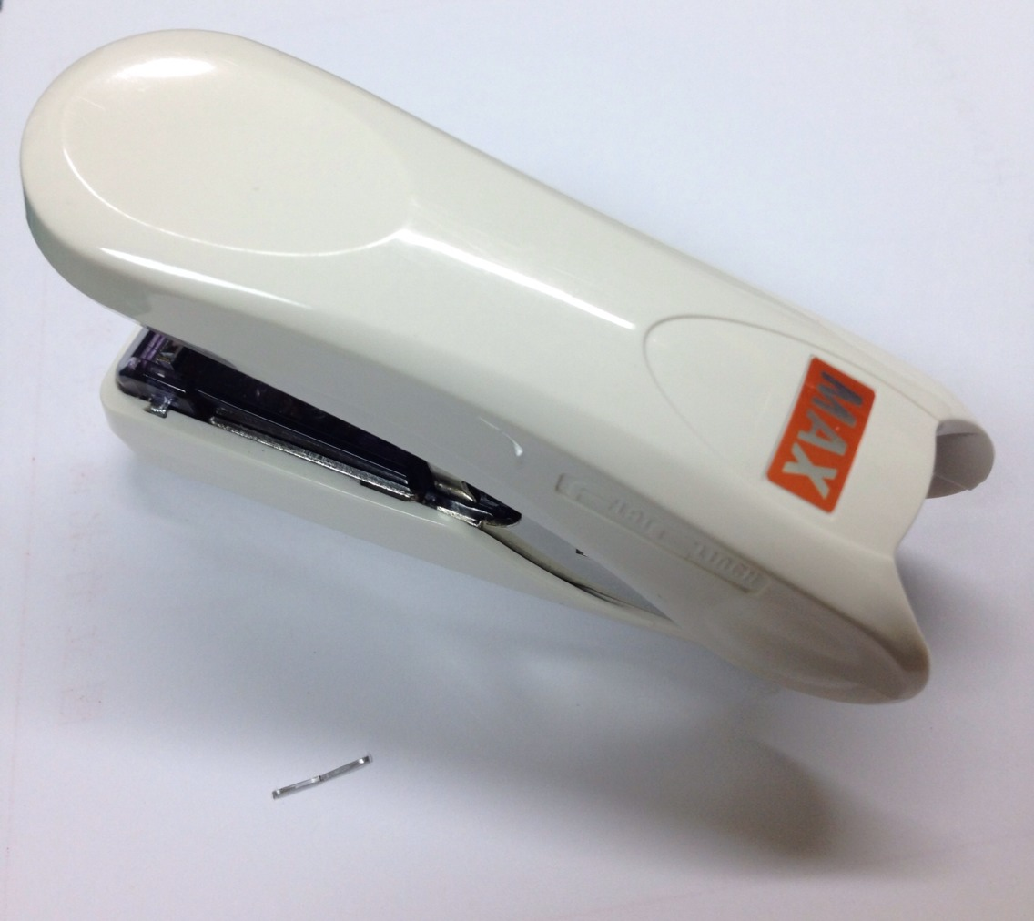 中文（台灣）: 平針釘書機